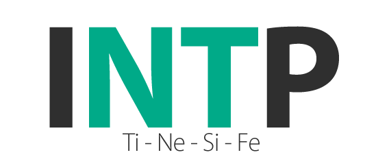 Logo INTP MBTI.